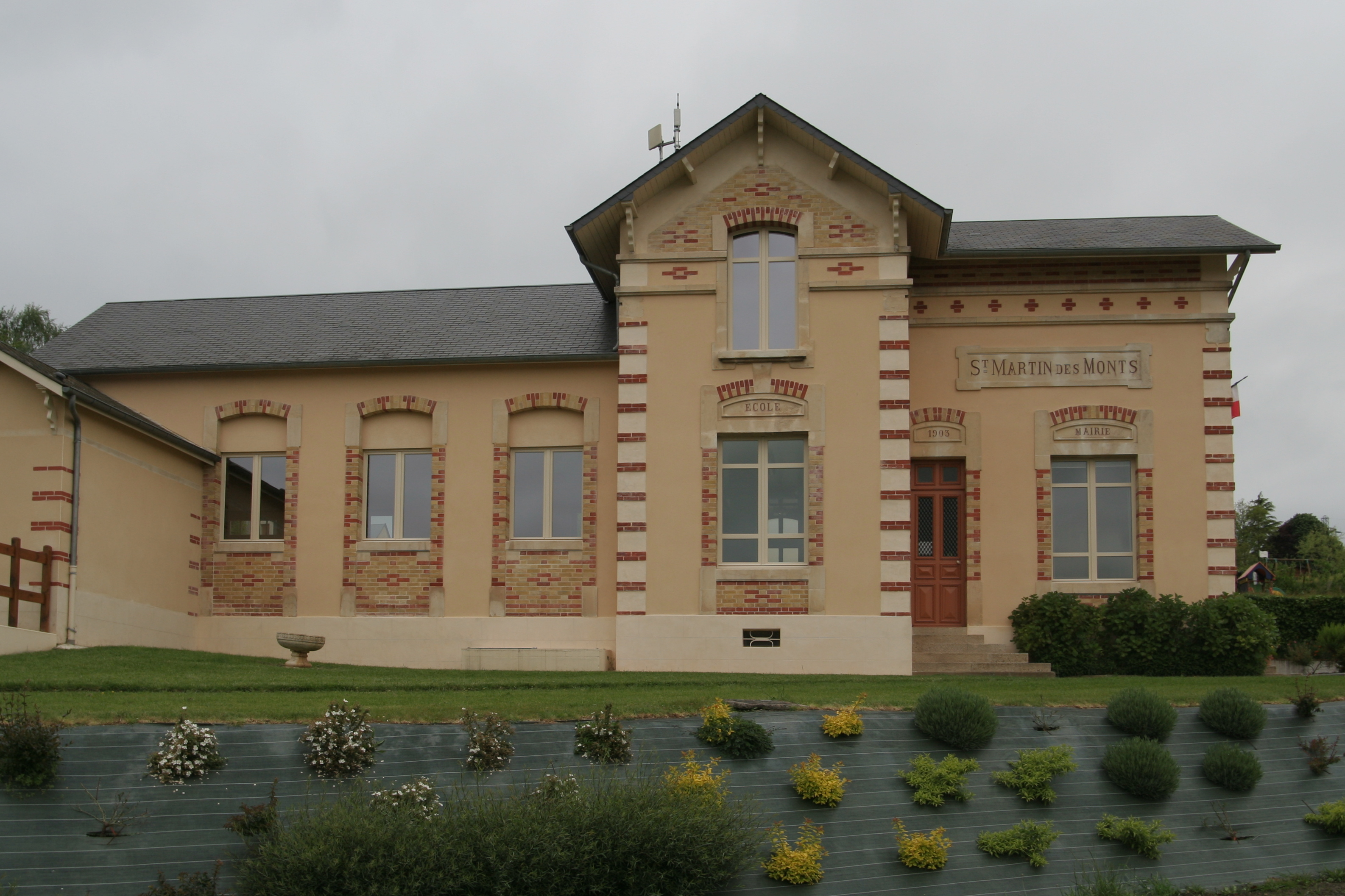 Mairie-école de Saint-Martin-des-Monts.